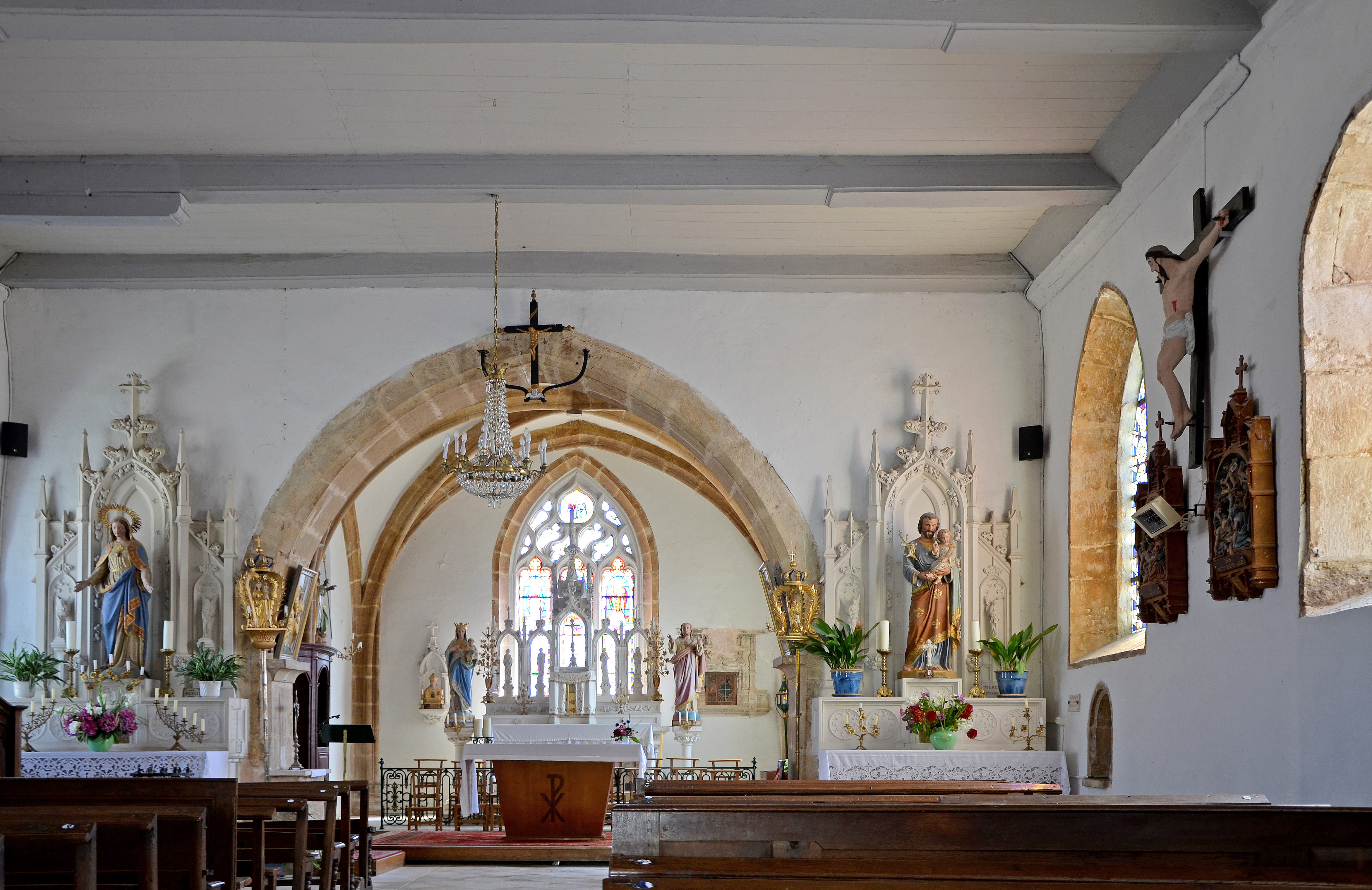 Église de Heuilley-Cotton, Haute-Marne, Chapagne-Ardennes, France